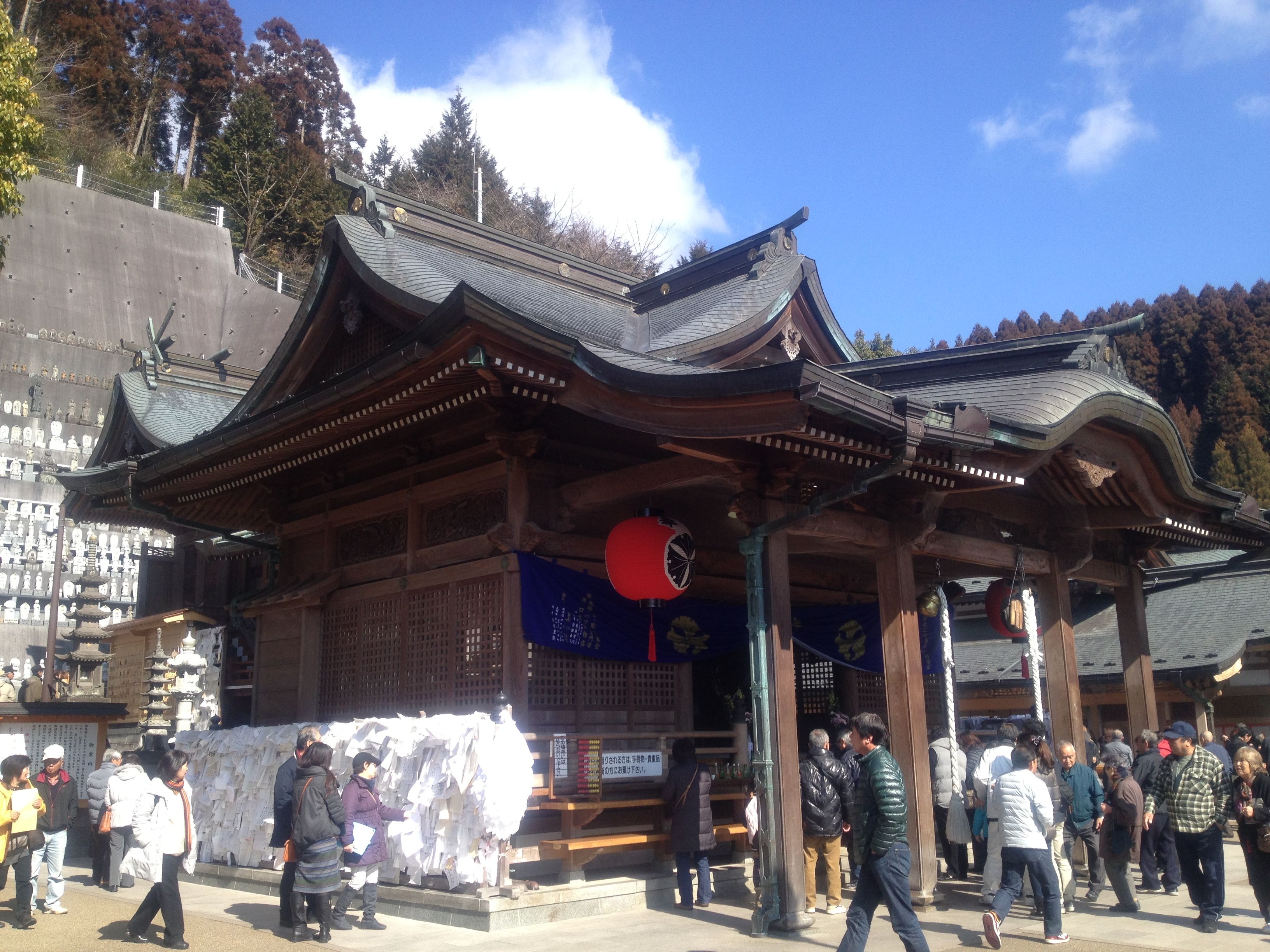 大分県日田市天瀬町馬原にある高塚愛宕地蔵尊の拝殿。